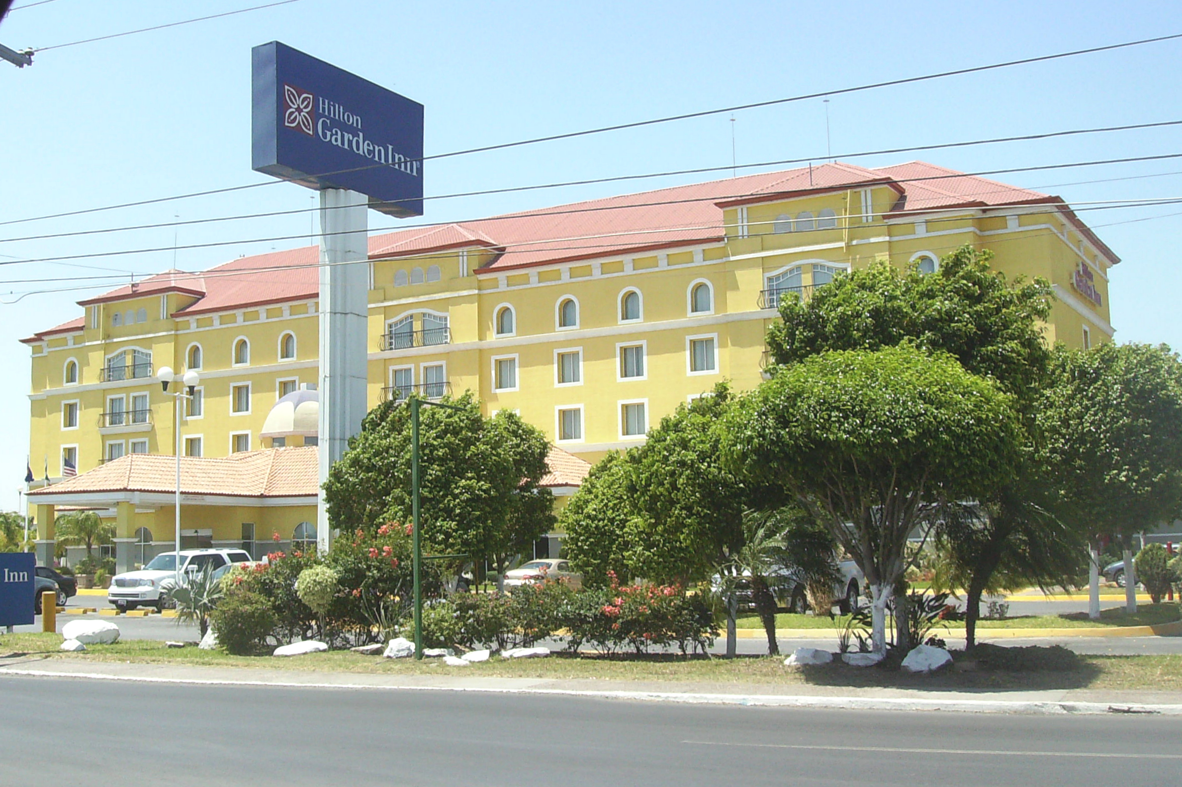 Hilron Garden Inn in Nuevo Laredo